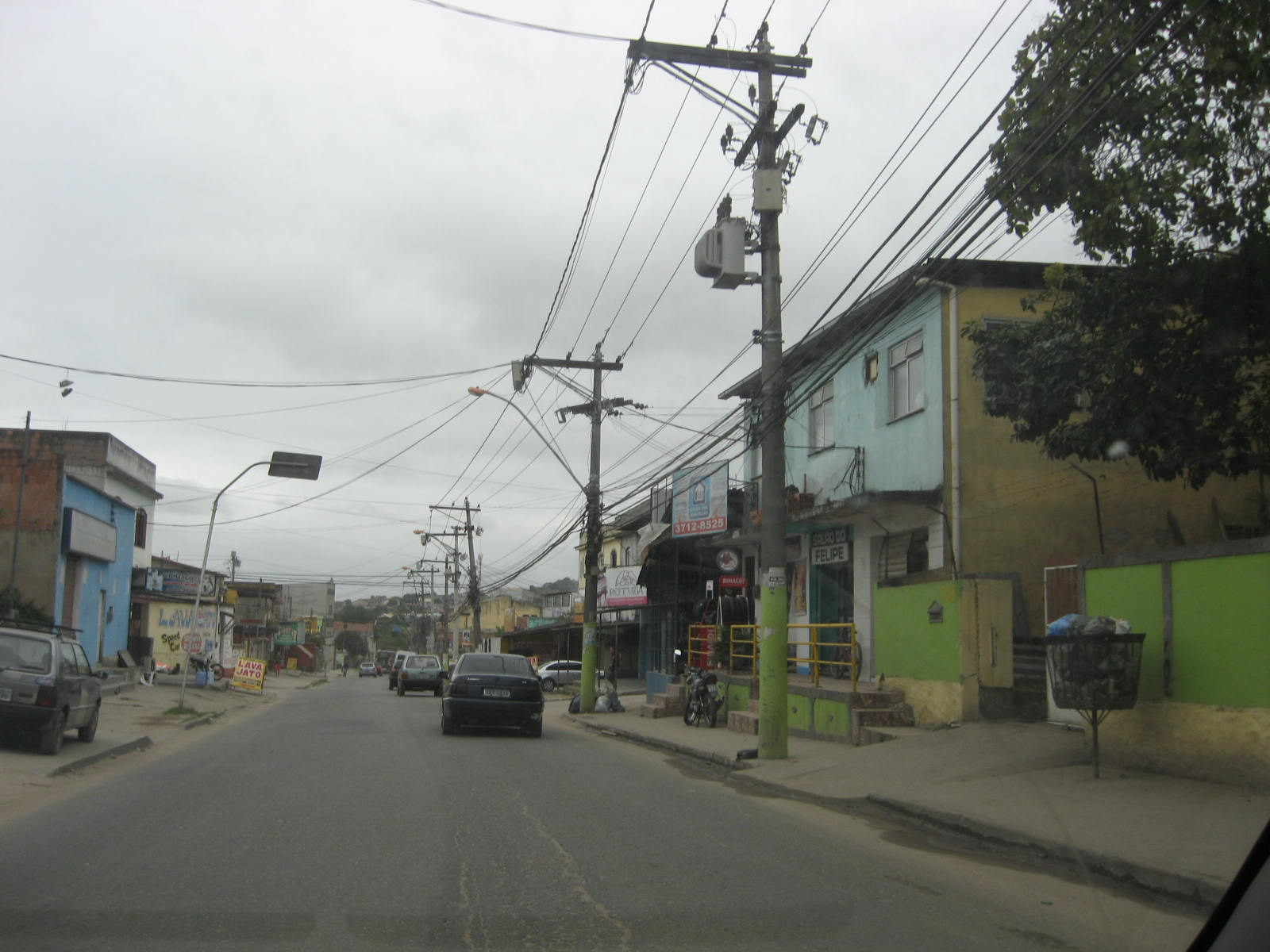 Lagoinha, bairro de São Gonçalo, estado do Rio de Janeiro.